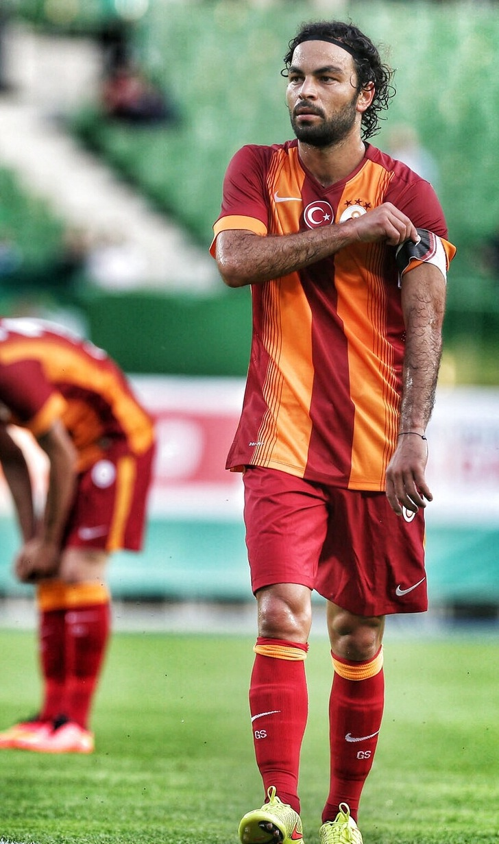 Selçuk İnan - Wien maçında